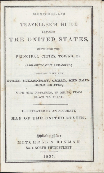 С.Митчелл "Руководство путешественника" 1837г.